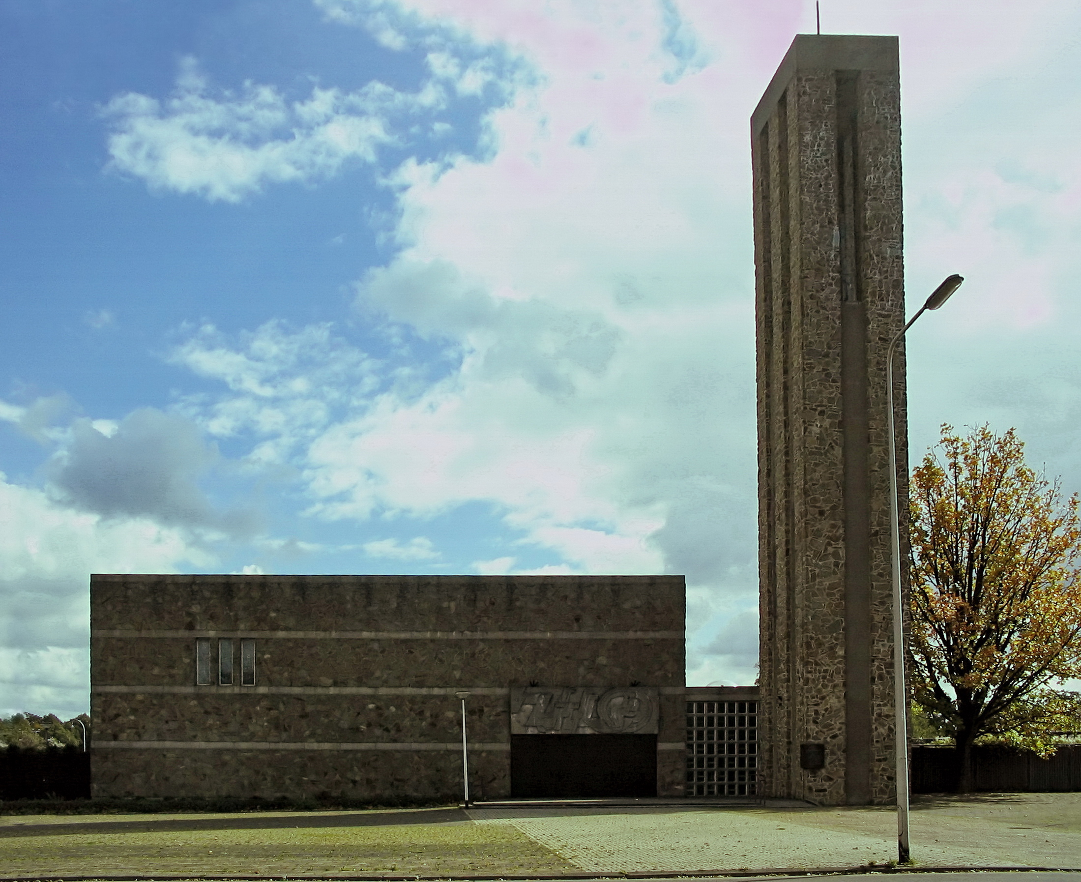 Blijde Boodschapkerk in Kerkrade